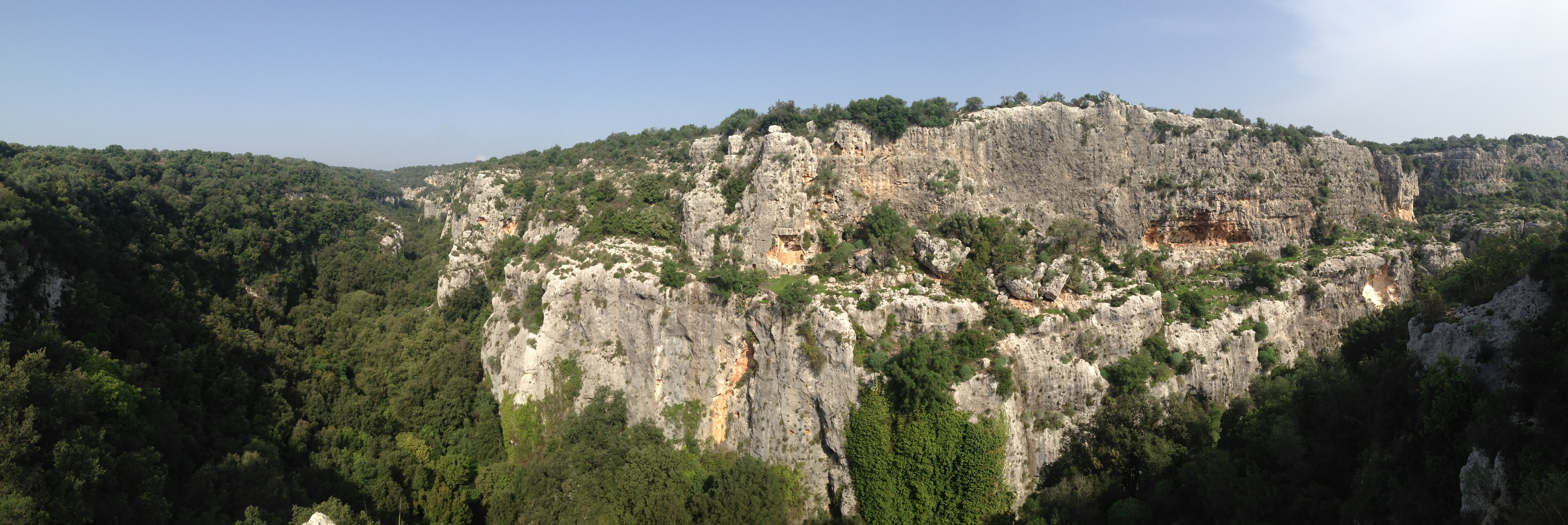 Cava minore poco distante da Cavagrande del Cassibile